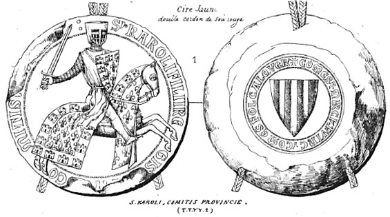 Segell de 1248 del comte Carles d'Anjou (1227-1285), casat amb la comtessa Beatriu de Provença, esdevinguent així comte de Provença i Forcalquier (1246-1285). (anvers i revers)